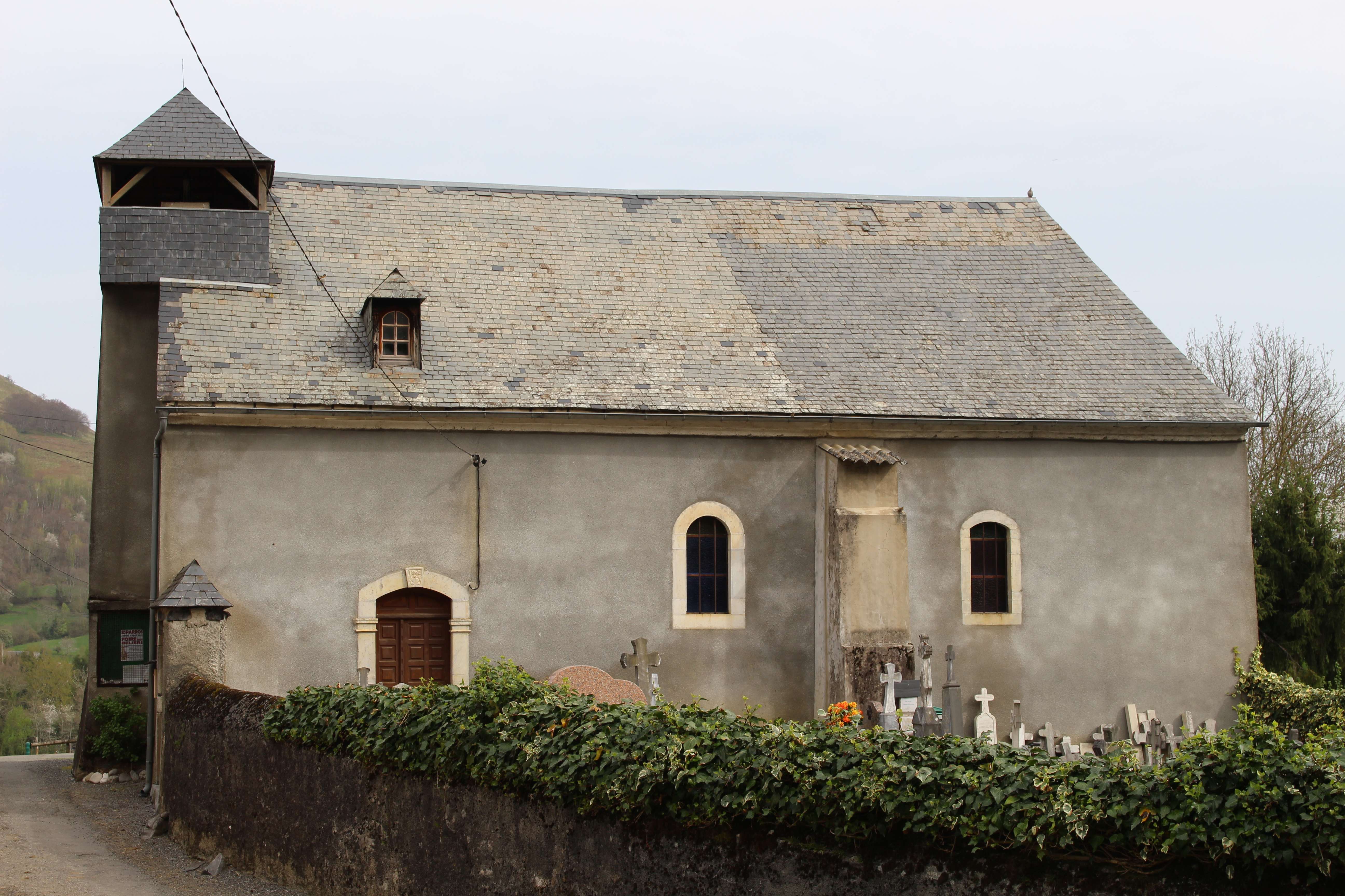 Église Saint-Blaise d'Arrodets (Hautes-Pyrénées)